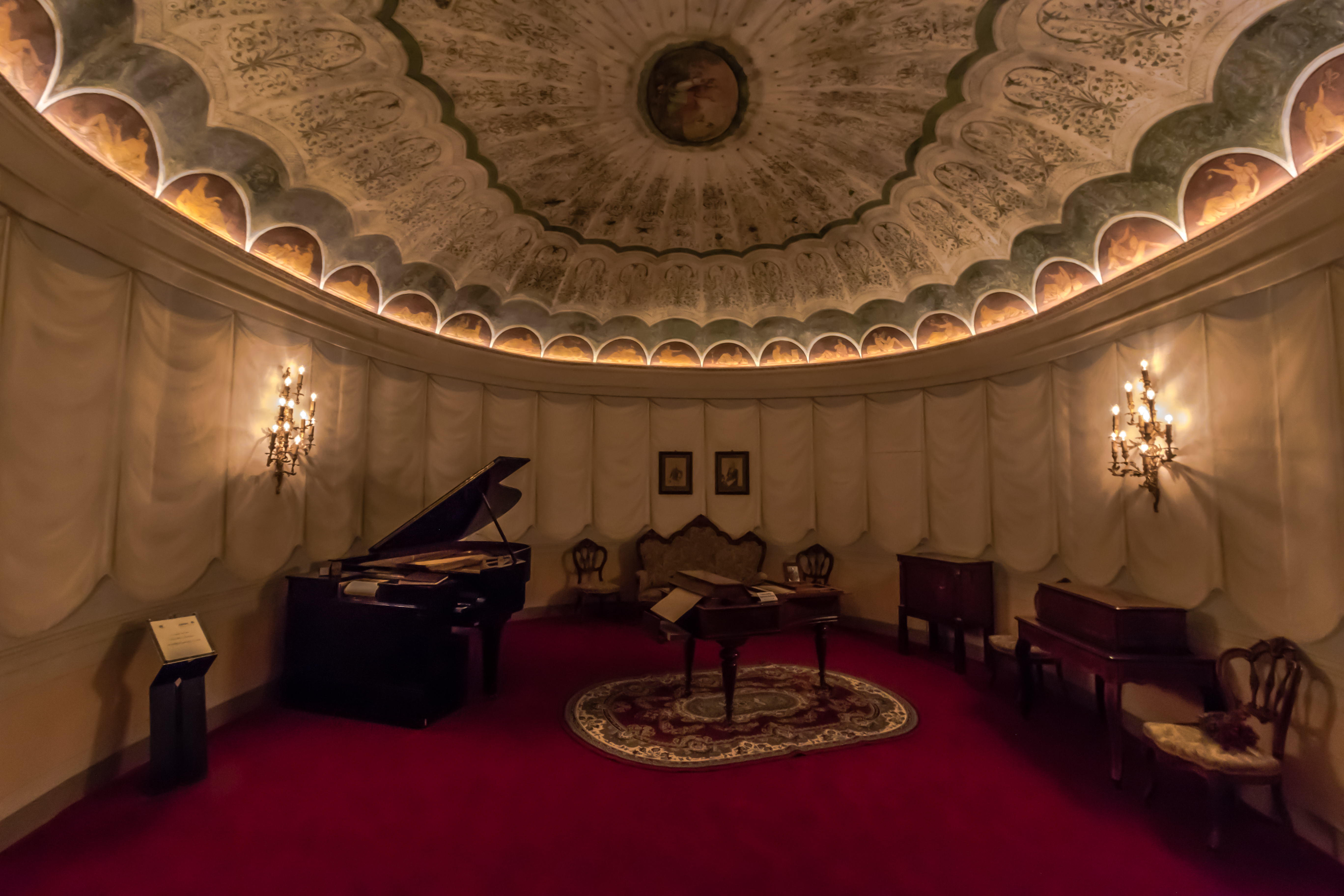 Suggestiva sala ovale e cupola con decorazioni floreali, fatta predisporre dalla contessa Silvia, in onore della Regina d’Italia Margherita di Savoia. La sala presenta un’acustica ottima per la musica classica. Vi sono esposti particolari esemplari di strumenti, tra cui un piano melodico della ditta bolognese Racca – funzionante a manovella con lettura di cartoni forati – direttamente appartenuto alla regina. Tra gli altri, non passa inosservato lo strumento tedesco “Dita Meccaniche” Welte, che leggendo dei rulli di carta traforati suona meccanicamente la tastiera di un pianoforte a coda. This is a photo of a monument which is part of cultural heritage of Italy.